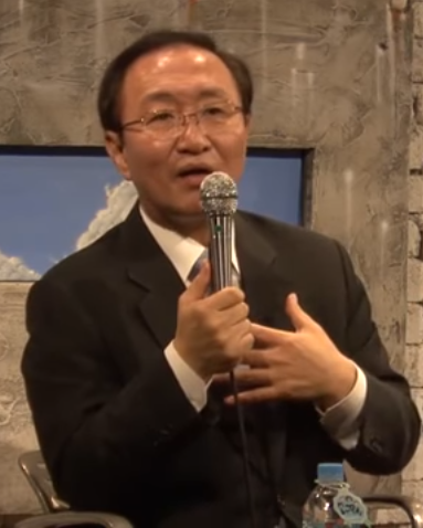 [벙커1특강] 노회찬 - THE 삼성 : 거인을 향해 진격하다